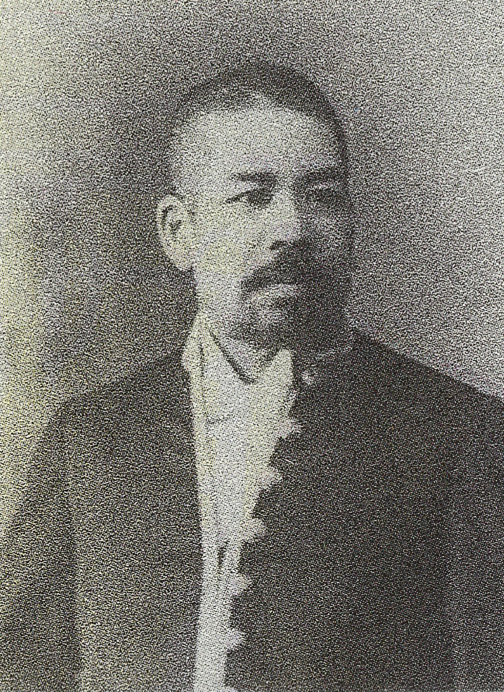 斎藤珪次の肖像写真。